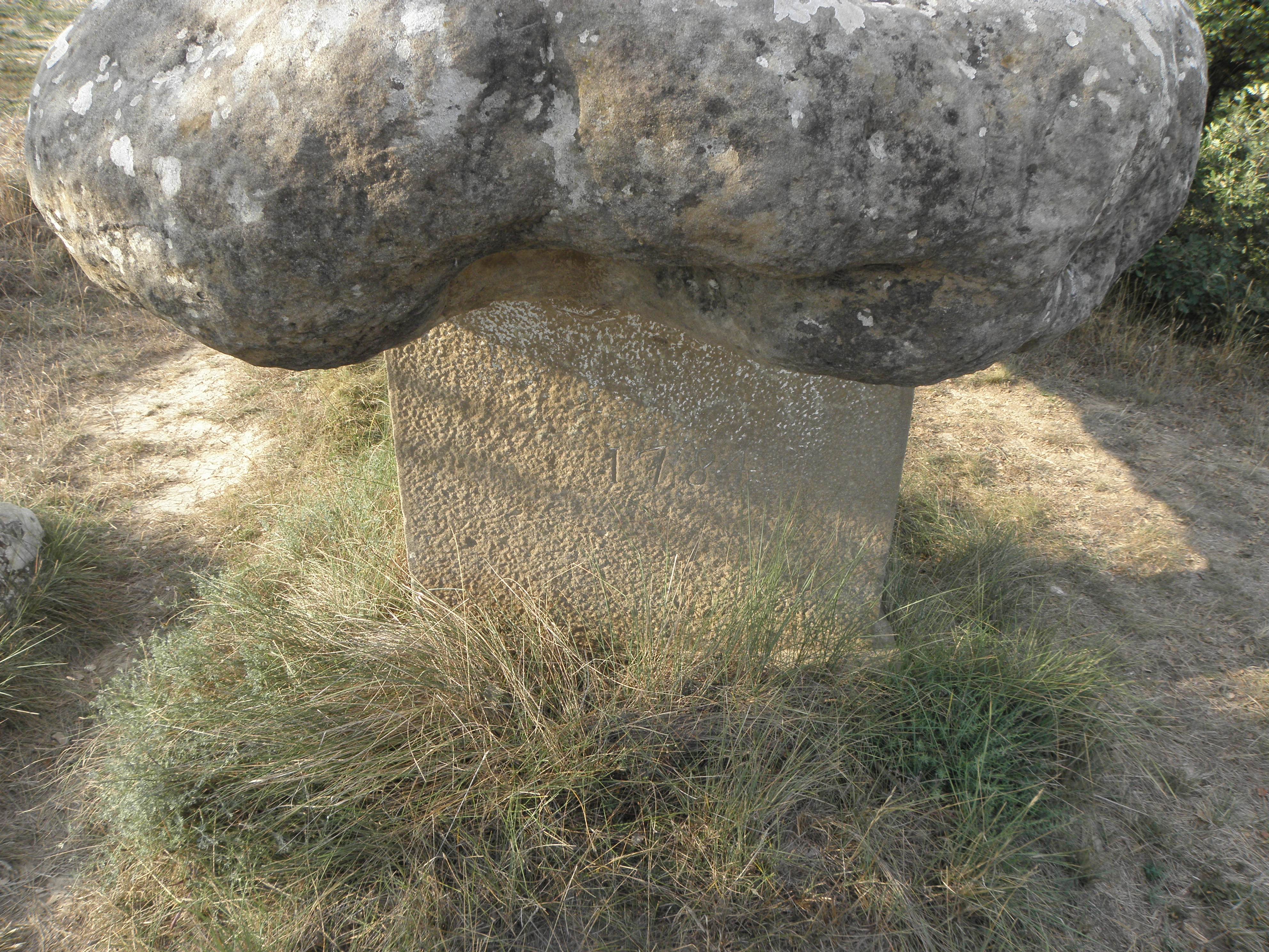 El roc de la Mare de Déu, a les rodalies del Santuari del Miracle (Riner, Solsonès). El pilar on hi ha gravada la data de 1784.